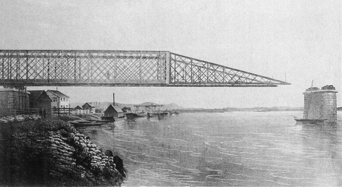 de: Bau der Stadlauer Brücke in Wien, 1869